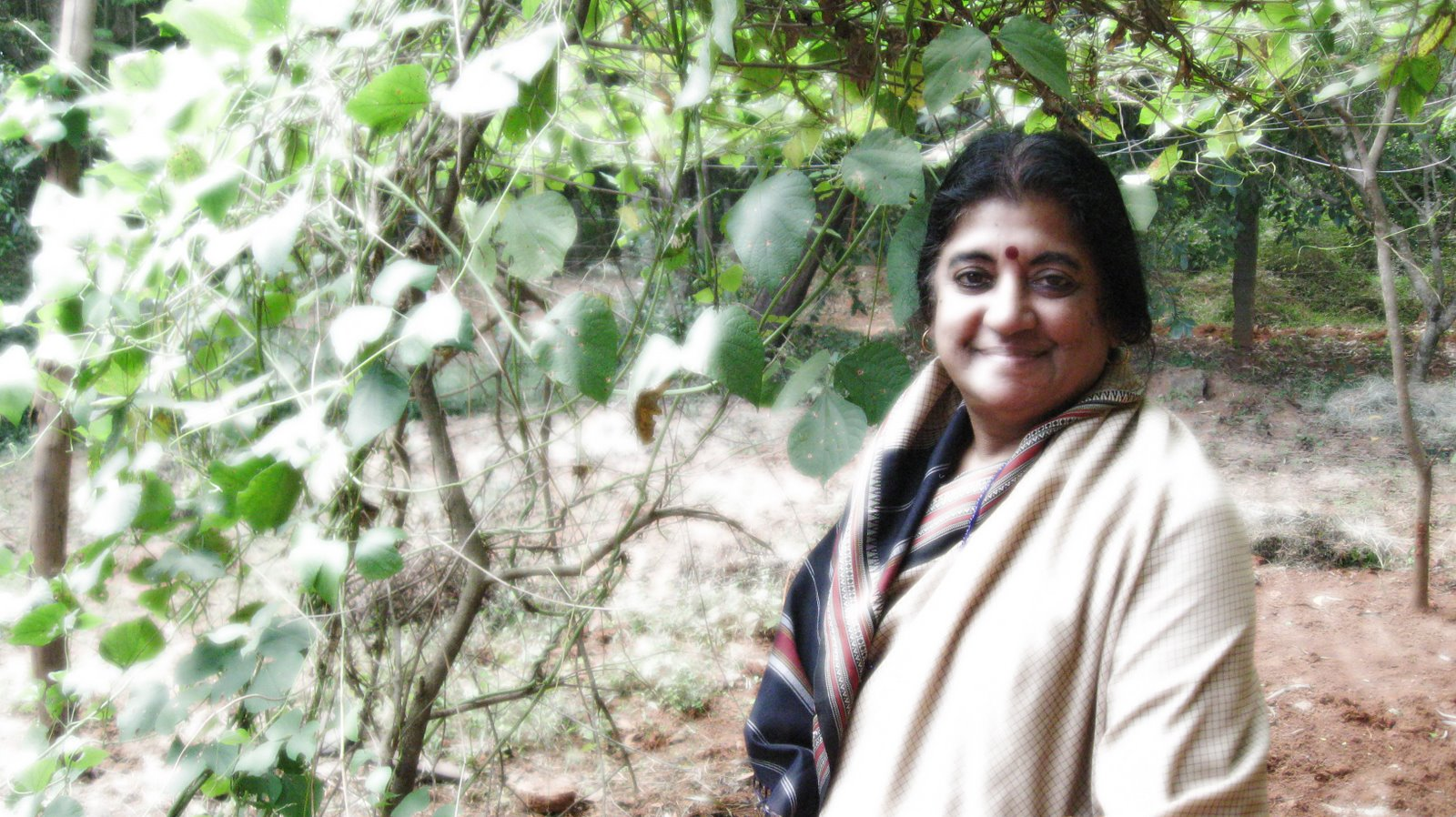 தமிழின் மூத்த பெண் எழுத்தாளரும், சாகித்திய அகாதெமியின் தமிழ் ஆலோசனைக்குழு உறுப்பினருமான கவிஞர் இரா.மீனாட்சி